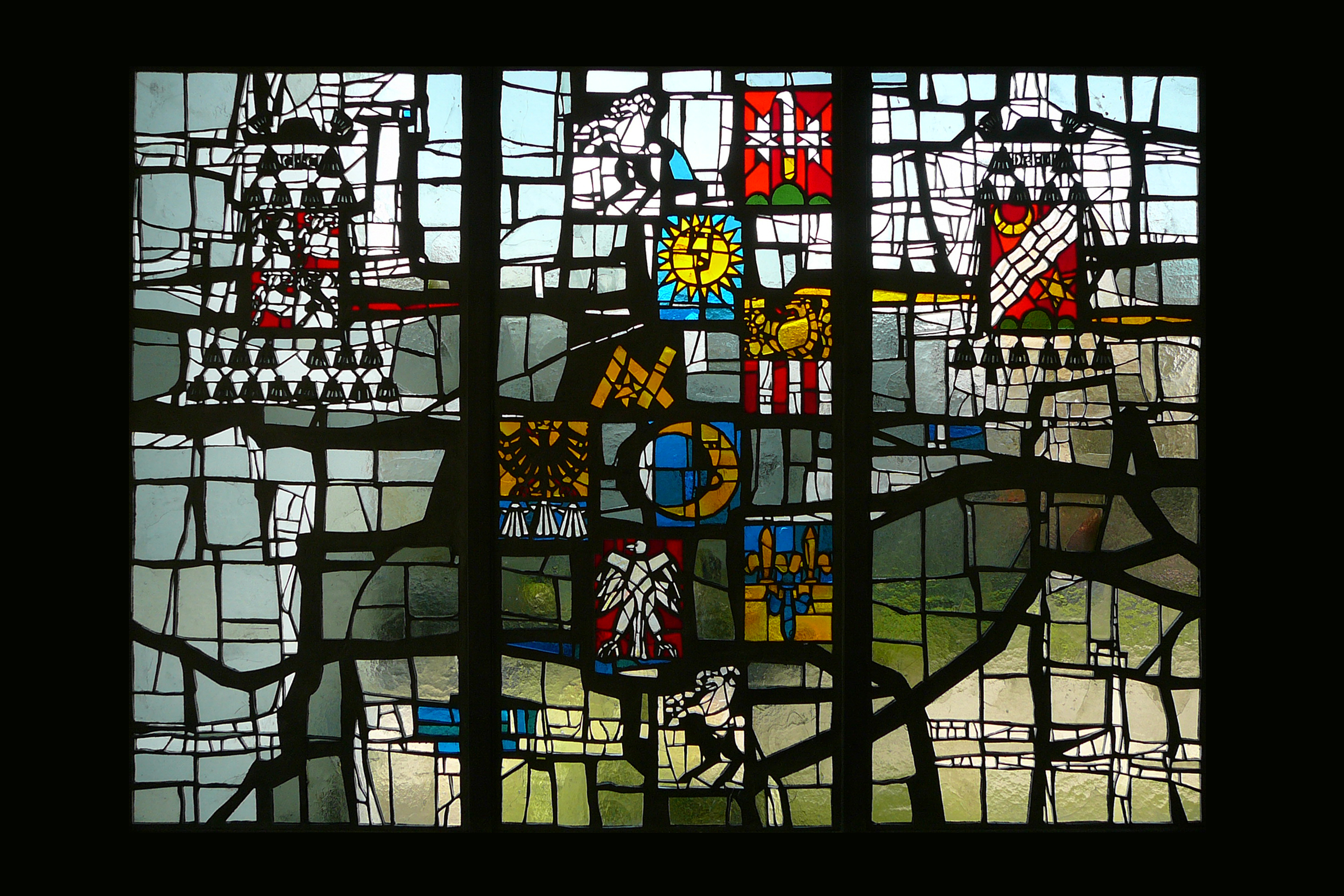 Römisch-katholische Pfarrkirche Bruder Klaus Urdorf, Glasfenster von Peter (Pierino) Travaglini